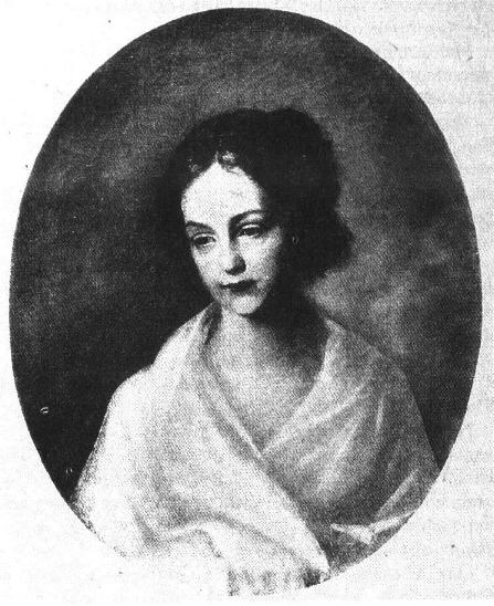 Auguste Böhmer, daughter of Caroline Böhmer - von Schlegel - von Schelling